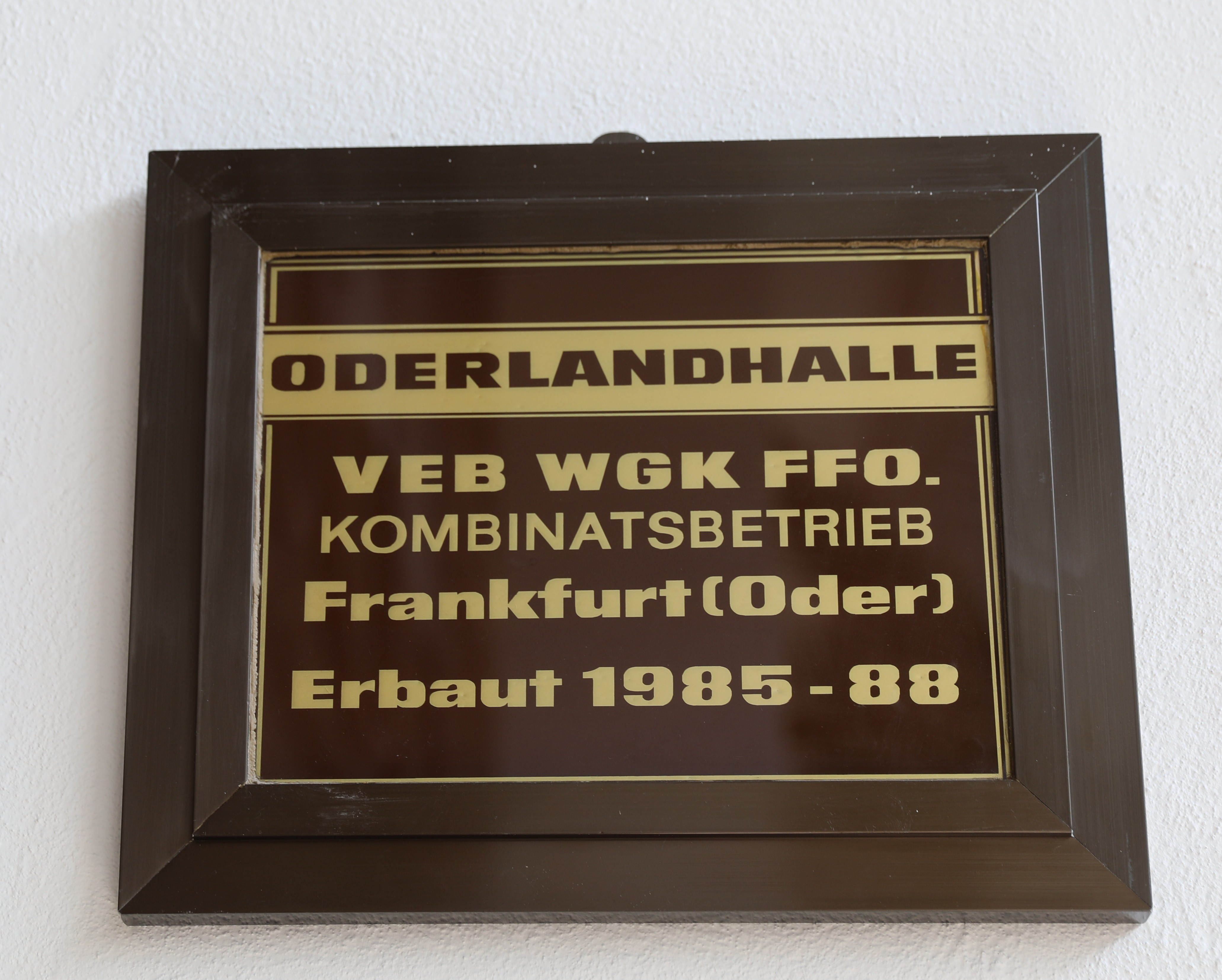 Tafel in der Oderlandhalle